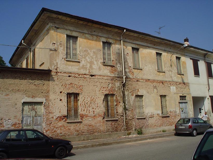 L'ex municipio di Borsano, ora fraz. di Busto Arsizio